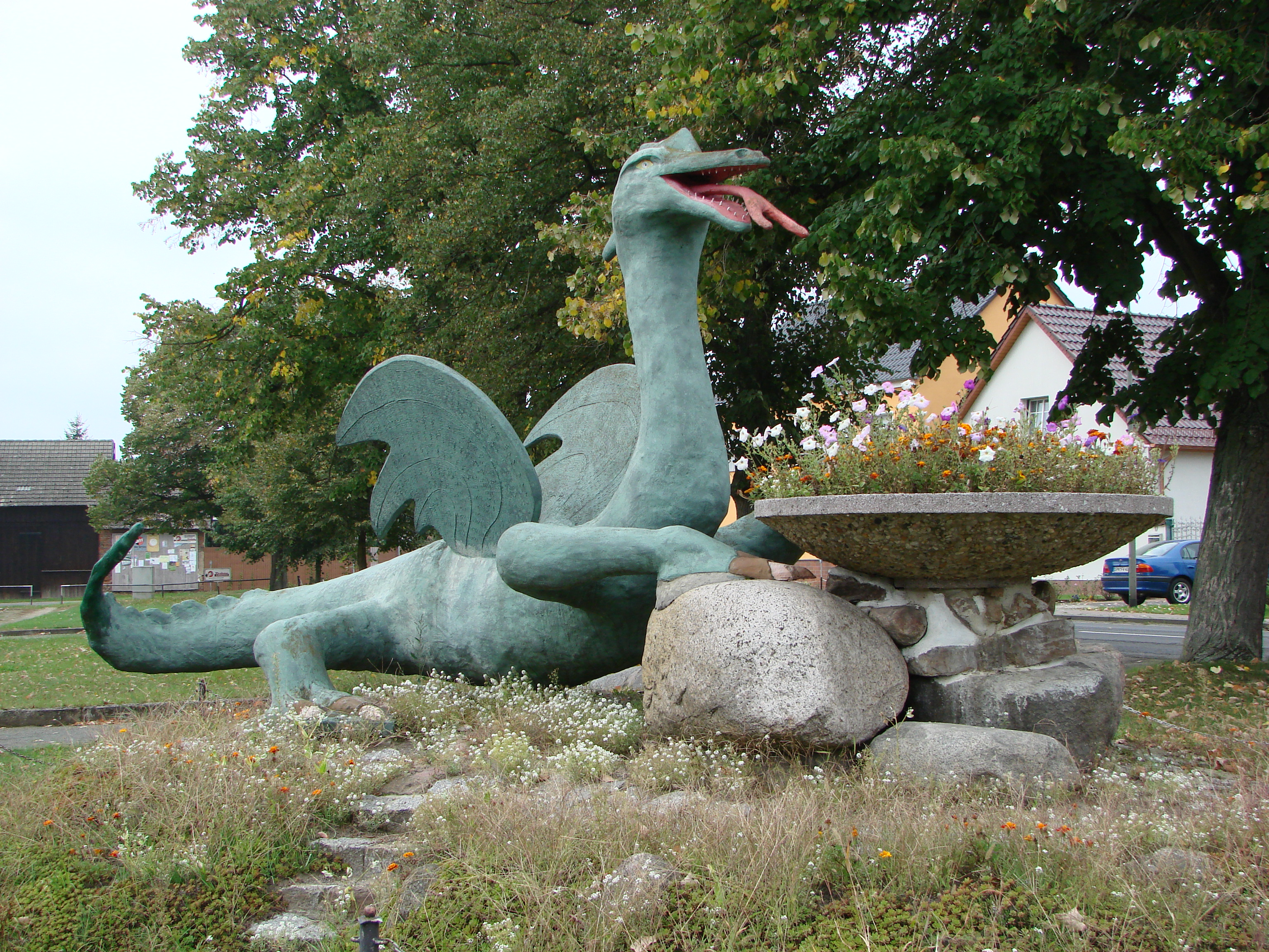 Der Drache aus der Sage um Drachhausen wird hier dargestellt.